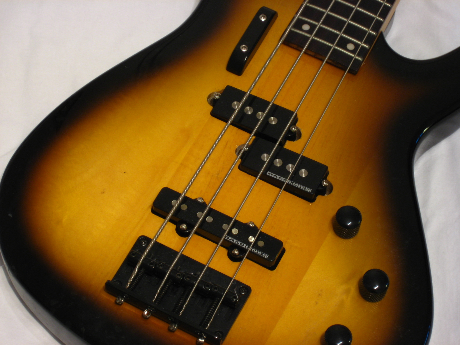 Kuva bassokitaran mikrofoneista. Kuvassa Seymour Duncan Quarter Pound™ for P-Bass® SPB-3 ja Hot for Jazz Bass® STK-J2 mikrofonit.